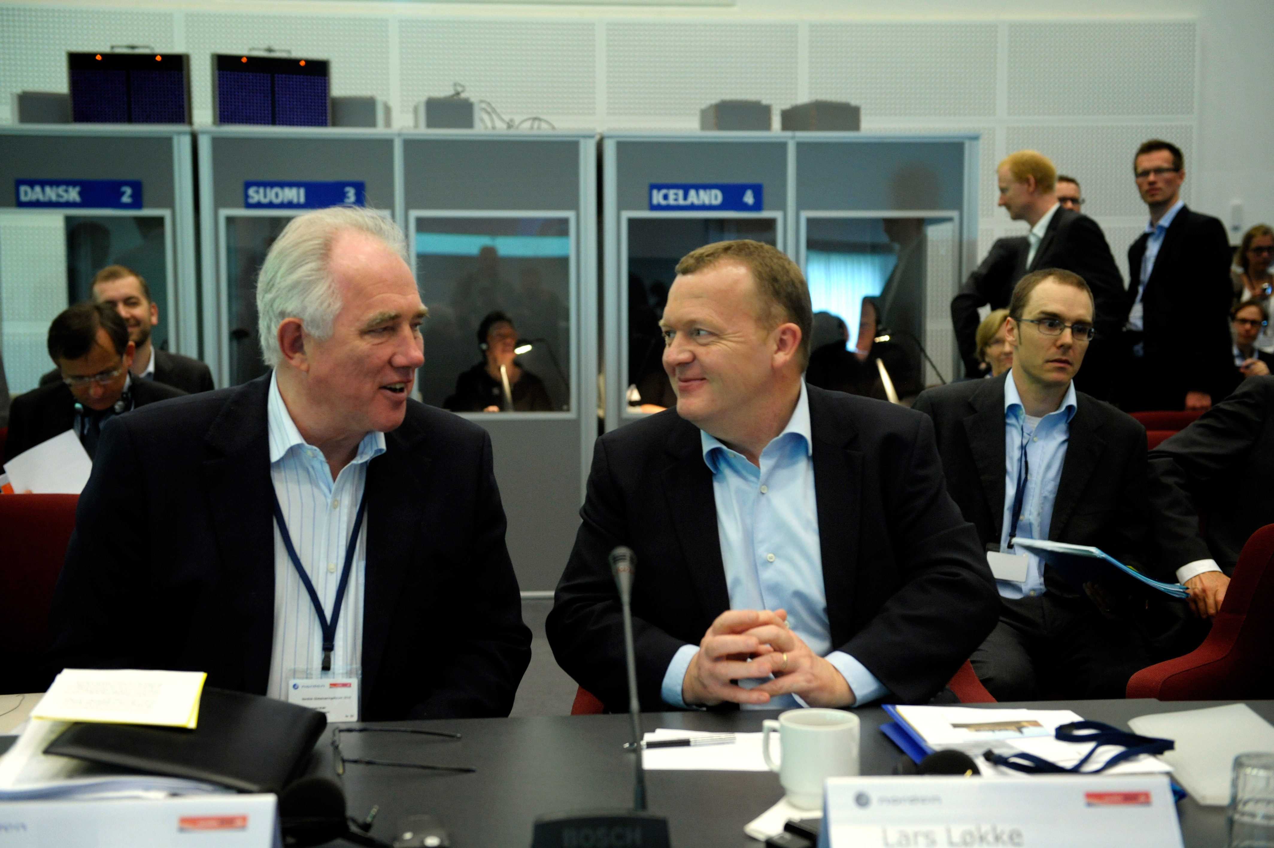 Nordiska ministerrådets generalsekreterare Halldór Ásgrímsson och Danmarks statsminister Lars Løkke Rasmussen på Nordiskt globaliseringsforum 2010.